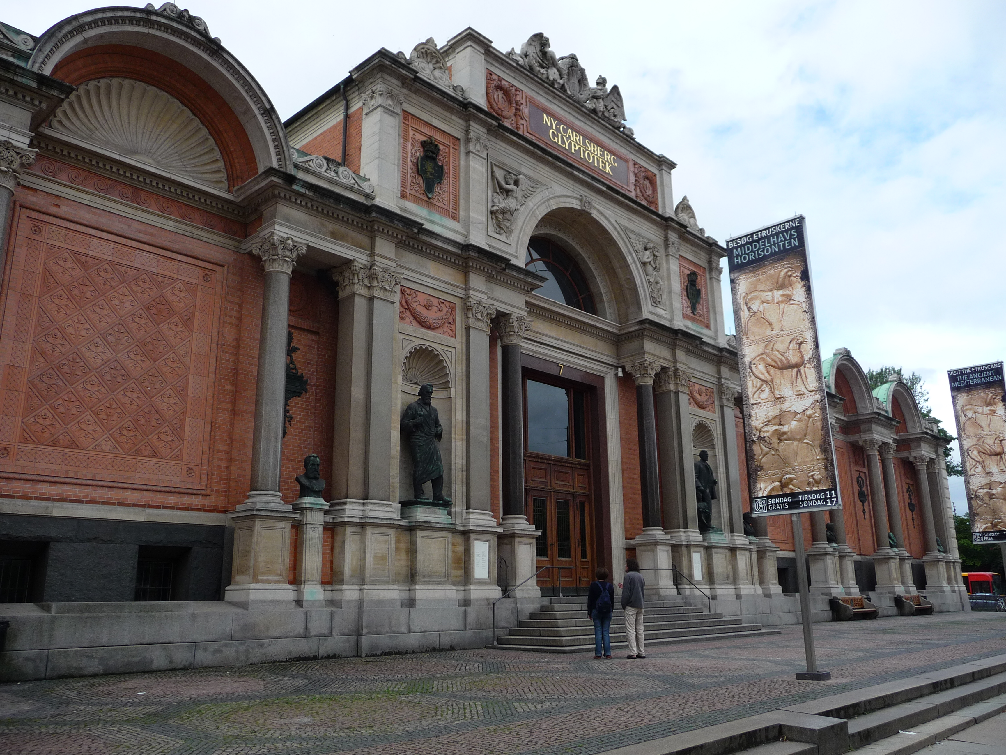 Ny Carlsberg Glyptotek